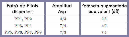 Tabla de potencias de las portadoras piloto.